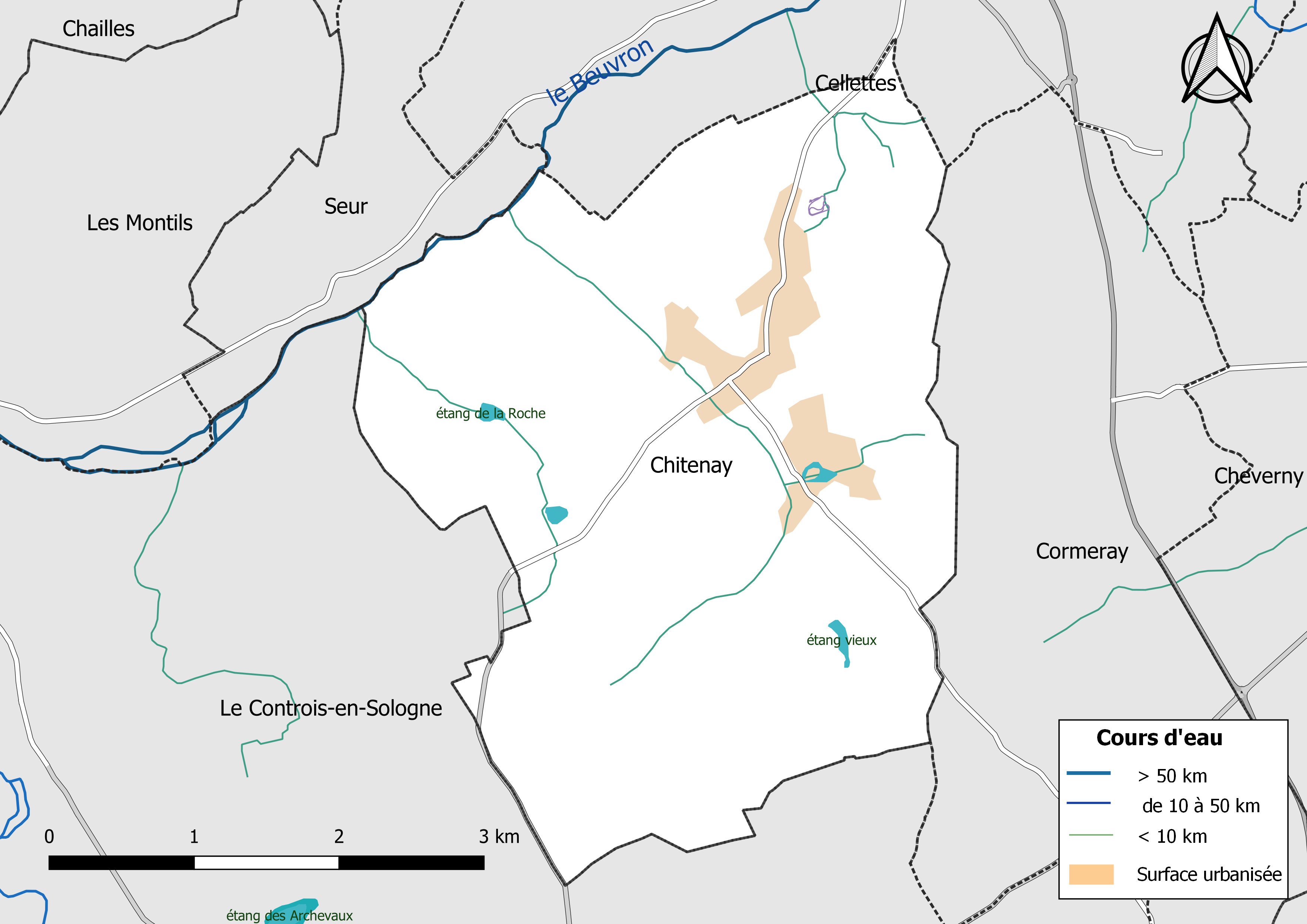 Carte du réseau hydrographique de la commune de Chitenay (Loir-et-Cher, France).